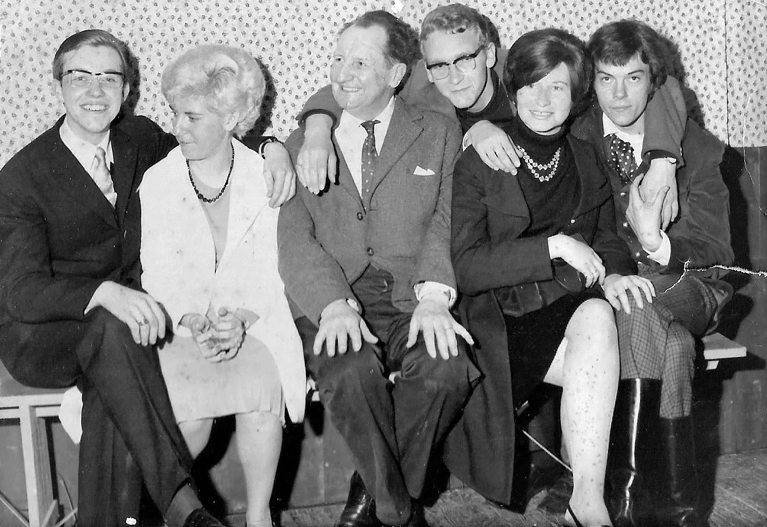 La nouvelle troupe de Cabotans d'Amiens entoure Maurice DOMON en 1967